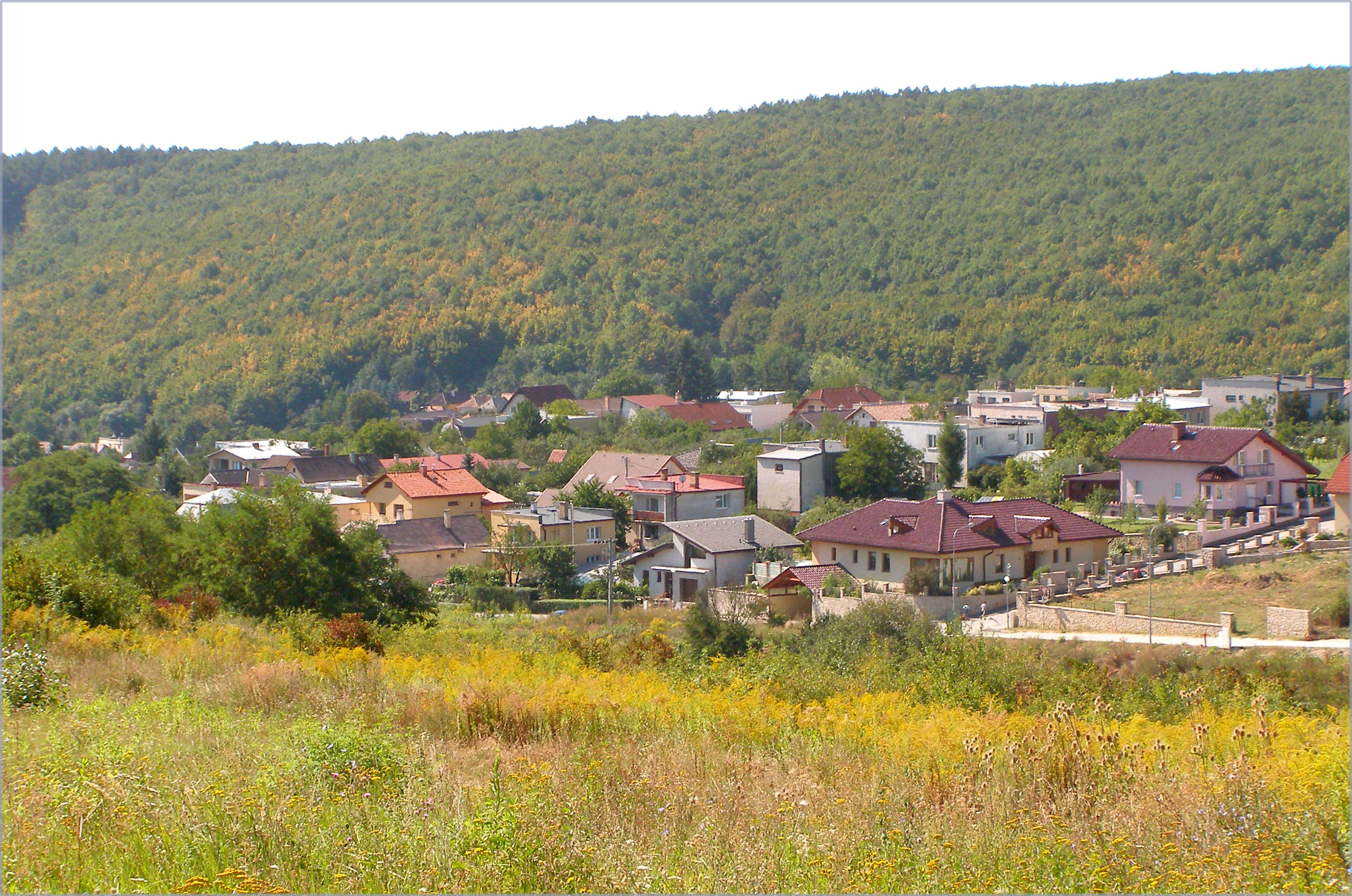 Myslava